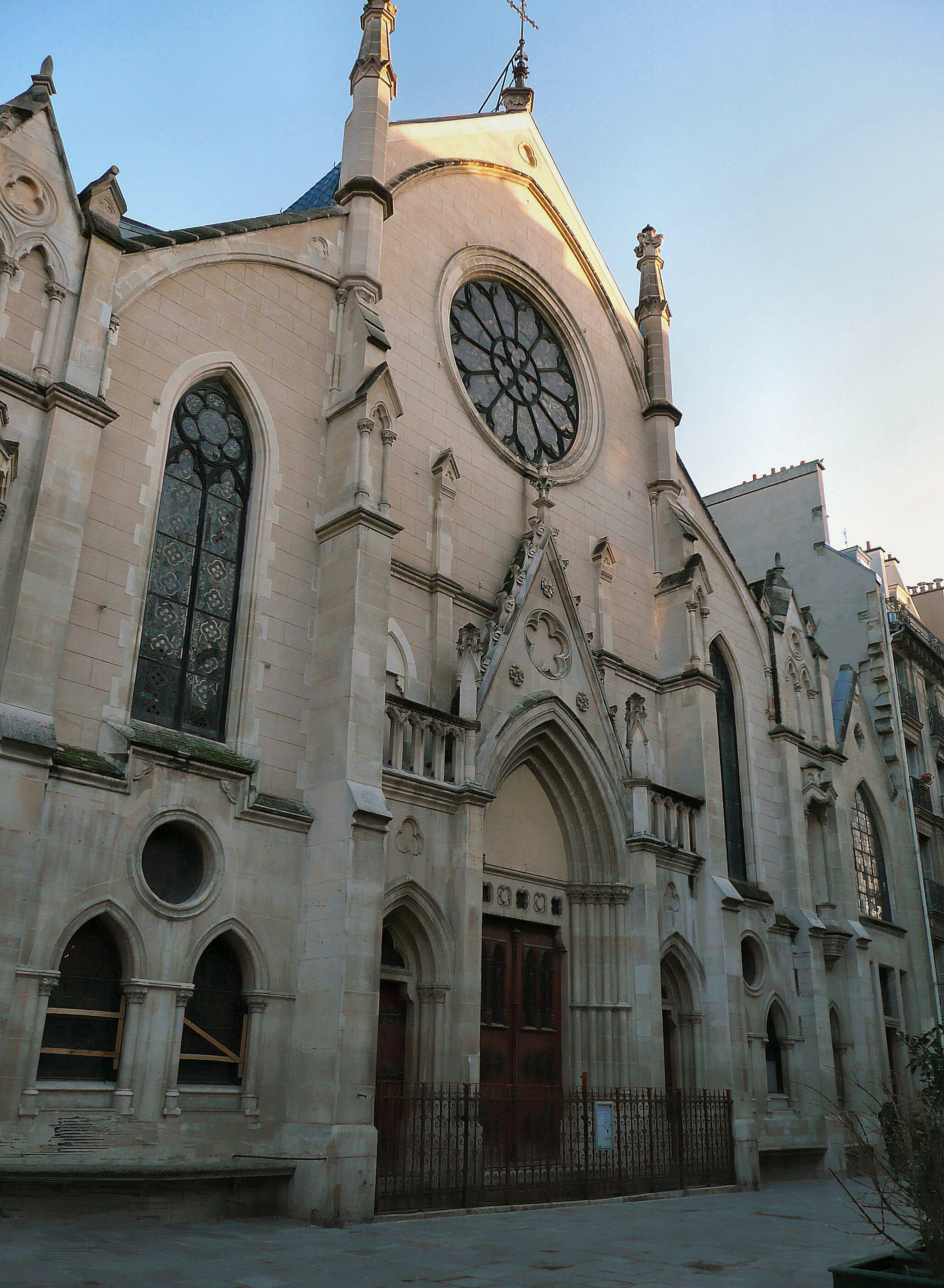 Façade de l'église Saint Eugène Sainte Cécile Paris